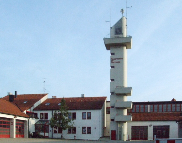 Freiwillige Feuerwehr Memmingen